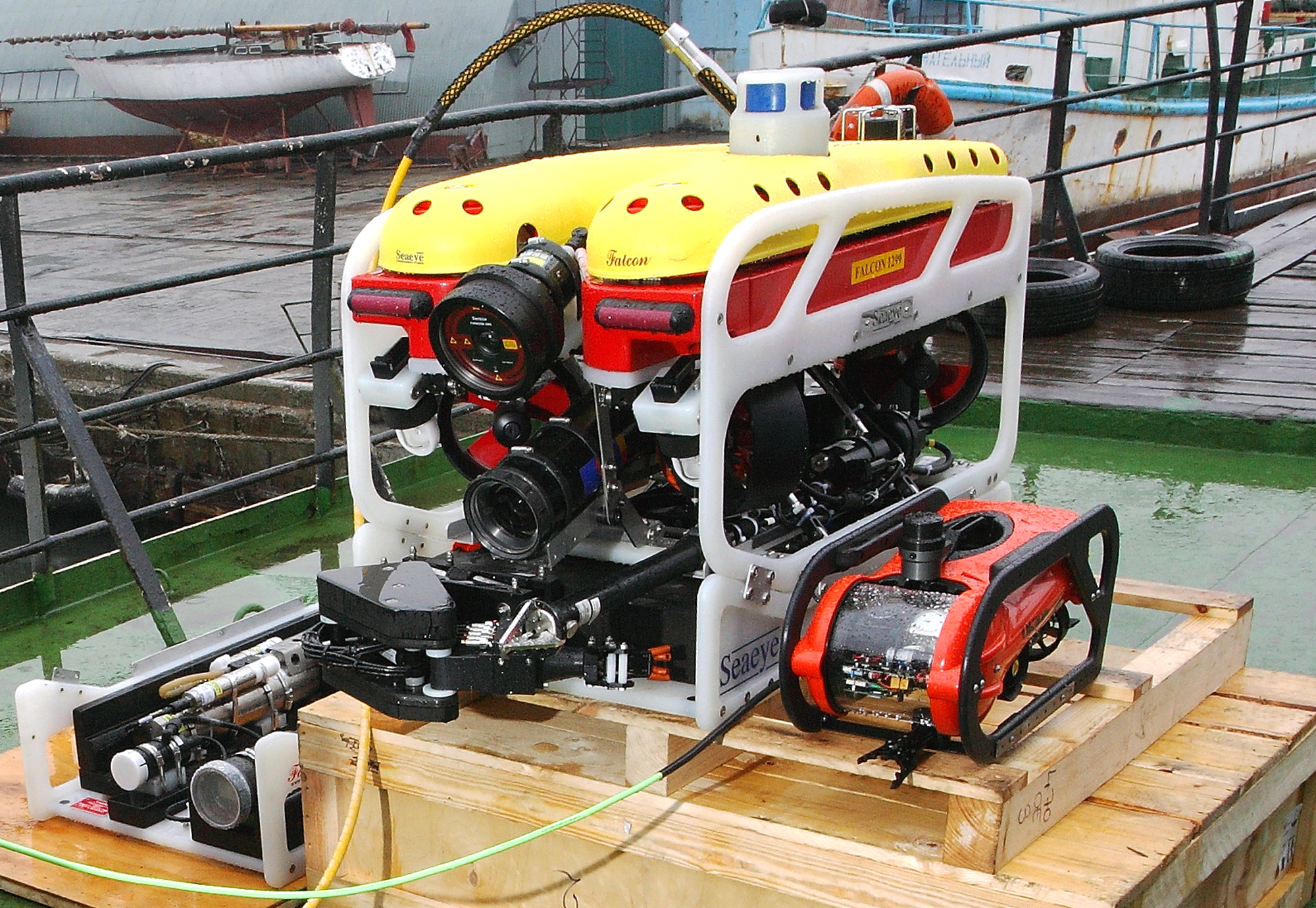 Seaeye Falcon 1299 и Обзор 150/2